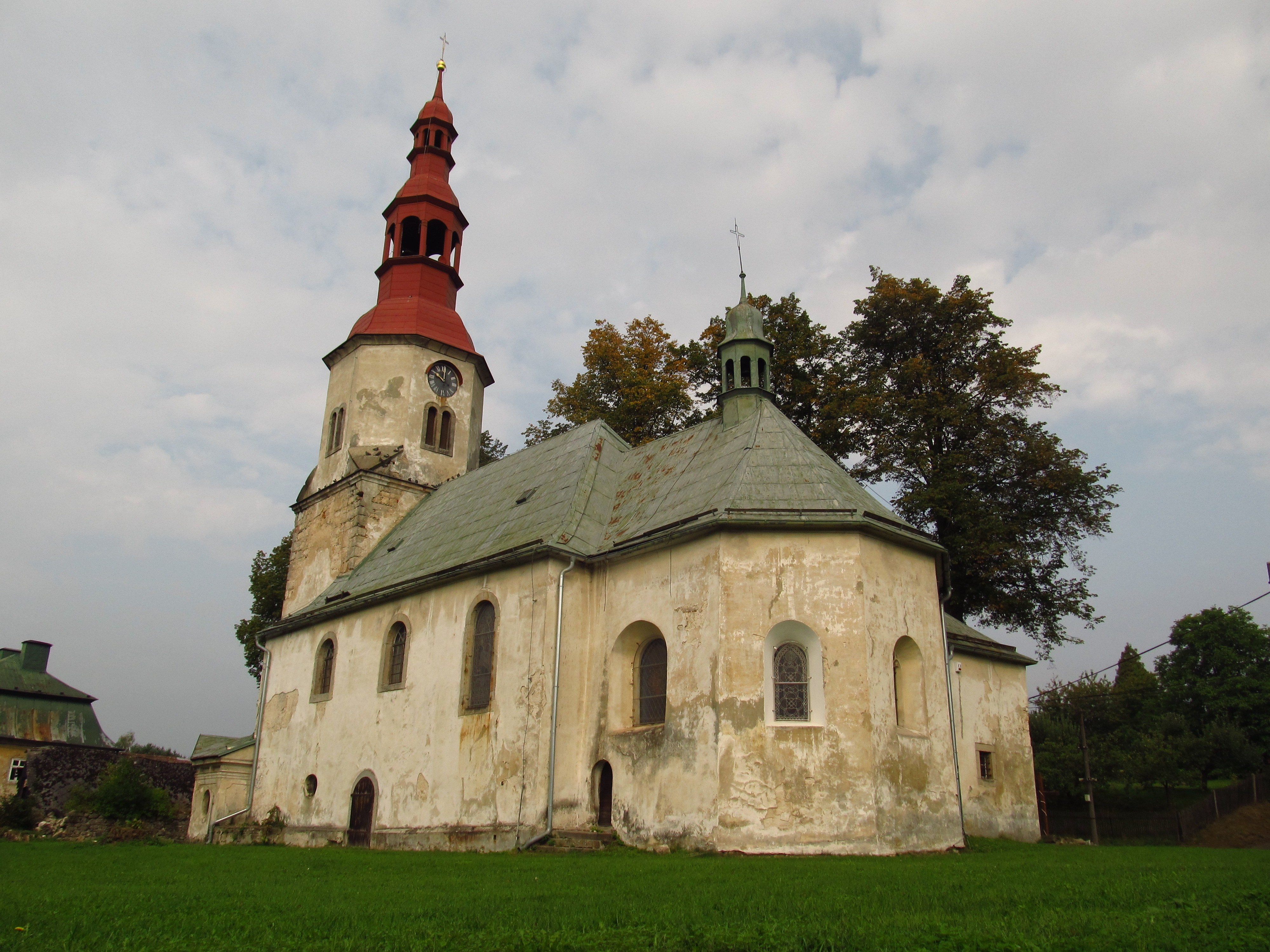 Kostel svatého Maxmiliána, západní část obce, jižní strana komunikace, Křižany.